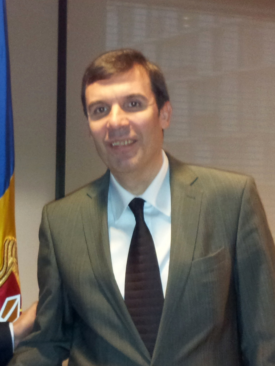 Visita Silvio Danailov, president de la ECU 14 i 15 de desembre del 2012